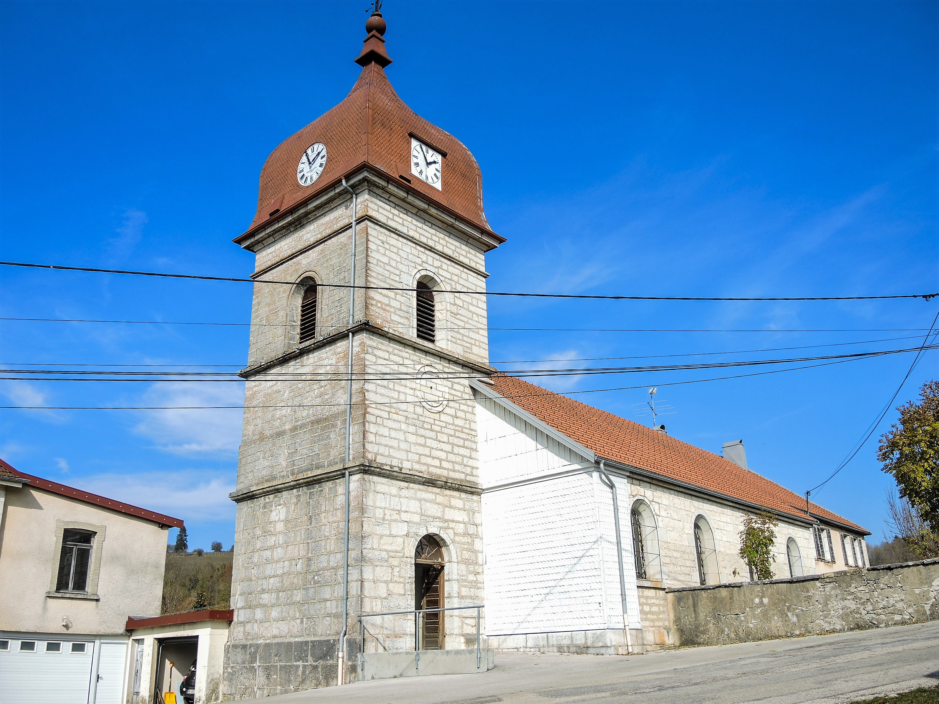 Eglise du Saint-Esprit. Village de Remonot. Les Combes. Doubs